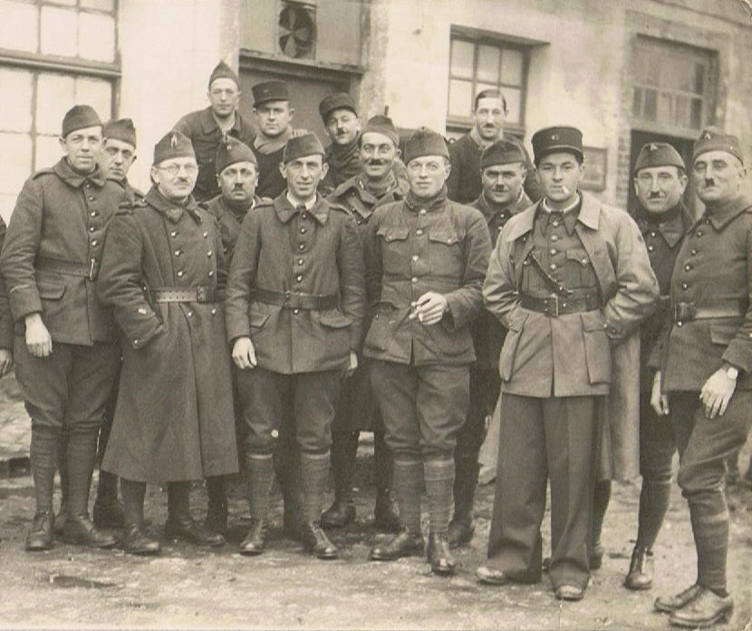 Durant la "drôle de guerre" (1939-40), cantonné avec ses hommes dans le Nord de la France, cigarette aux lèvres, le jeune lieutenant André PAYAN (1913-1984) qui est passé par l'Ecole des officiers de réserve de Saint-Maixent.